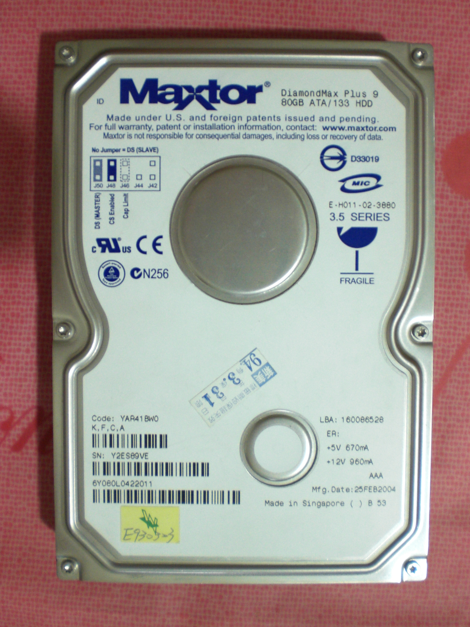 Maxtor 3.5吋硬碟6Y080L0422011，使用IDE介面，容量為80GB，製造日期為2004年2月25日